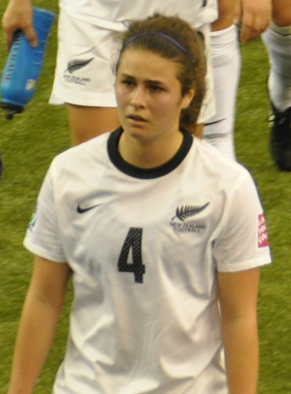 Coupe du monde féminine FIFA U-20